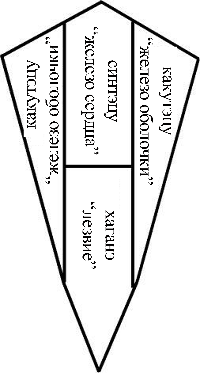 Расположение сталей разных типов в катане